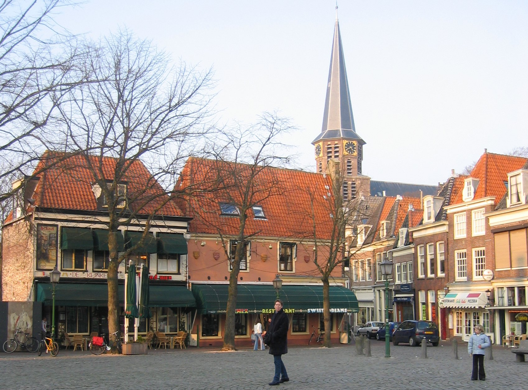 Eigen foto: Hoorn (NH) Rode Steen GerardM 3 mrt 2004 17:56 (CET) Hoorn